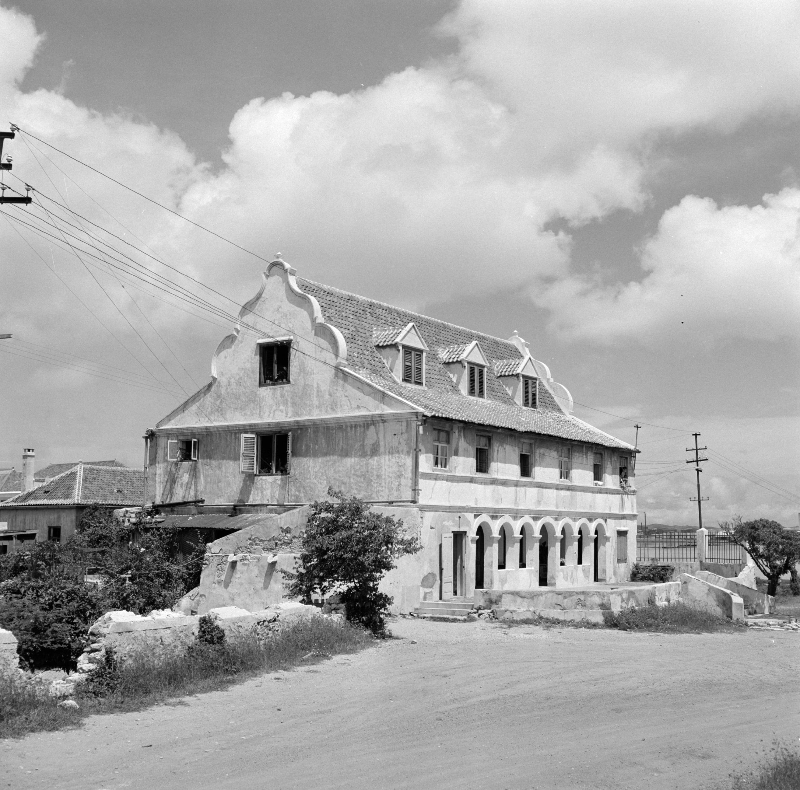 Collectie / Archief : Fotocollectie Van de Poll Reportage / Serie : Nederlandse Antillen en Suriname ten tijde van het koninklijk bezoek van koningin Juliana en prins Bernhard in 1955 Beschrijving : Landhuis Habaai bij Willemstad Datum : 1 oktober 1955 Locatie : Curaçao, Nederlandse Antillen, Willemstad Trefwoorden : landhuizen Fotograaf : Poll, Willem van de Auteursrechthebbende : Nationaal Archief Materiaalsoort : Negatief (zwart/wit) Nummer archiefinventaris : bekijk toegang 2.24.14.02 Bestanddeelnummer : 252-3250